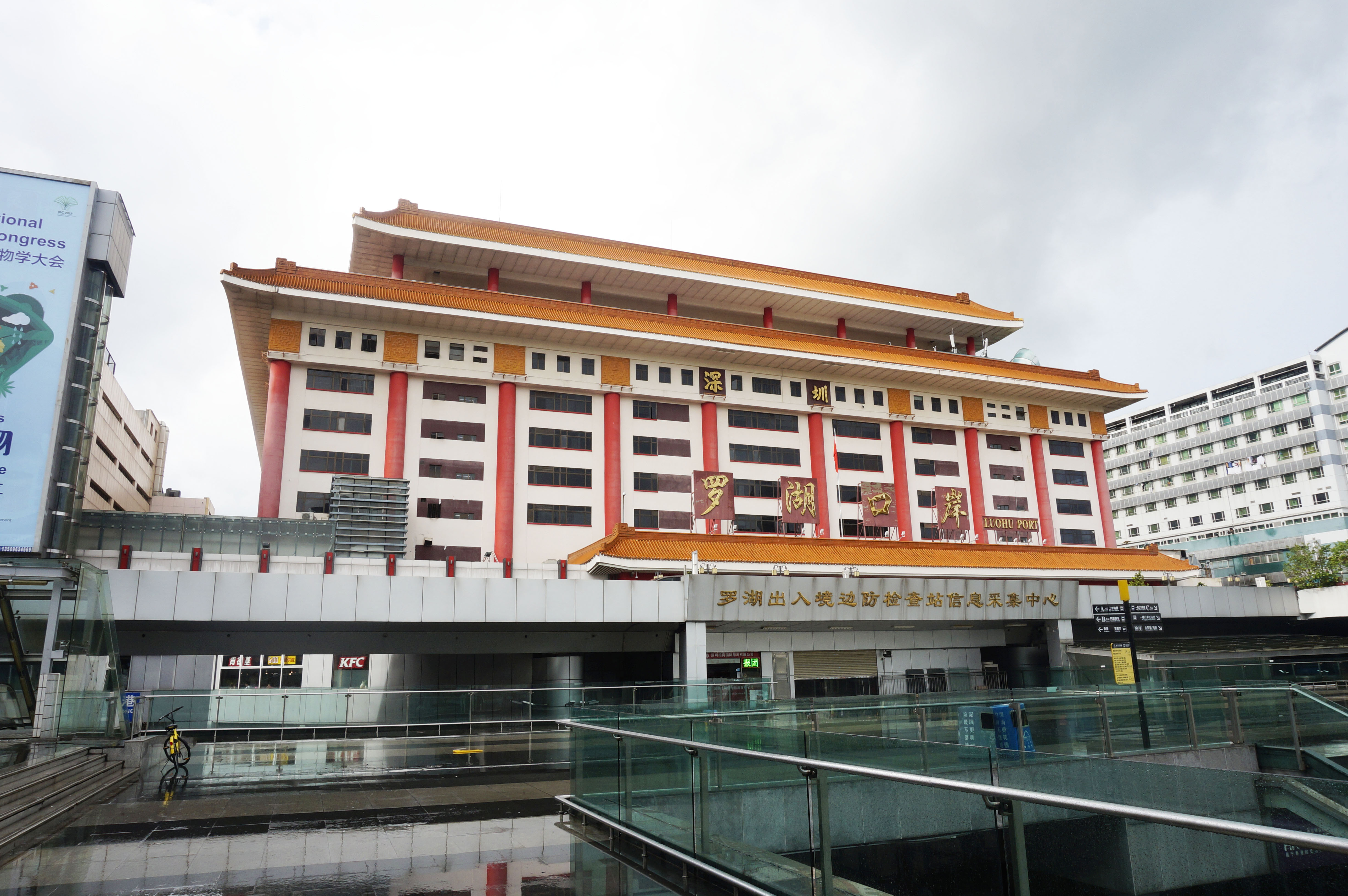 港鐵羅湖站旁側的羅湖口岸